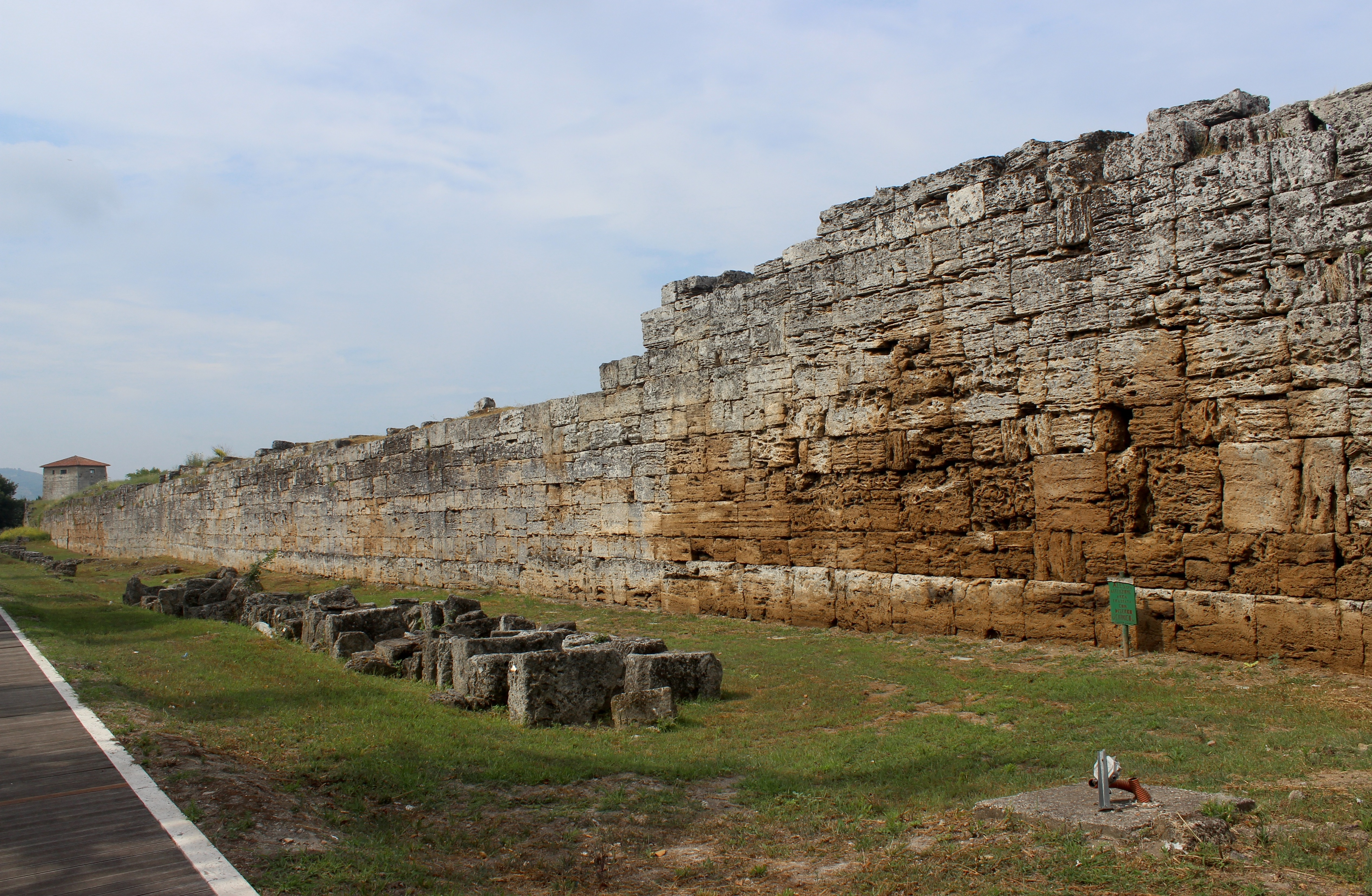 Paestum. Muralla.